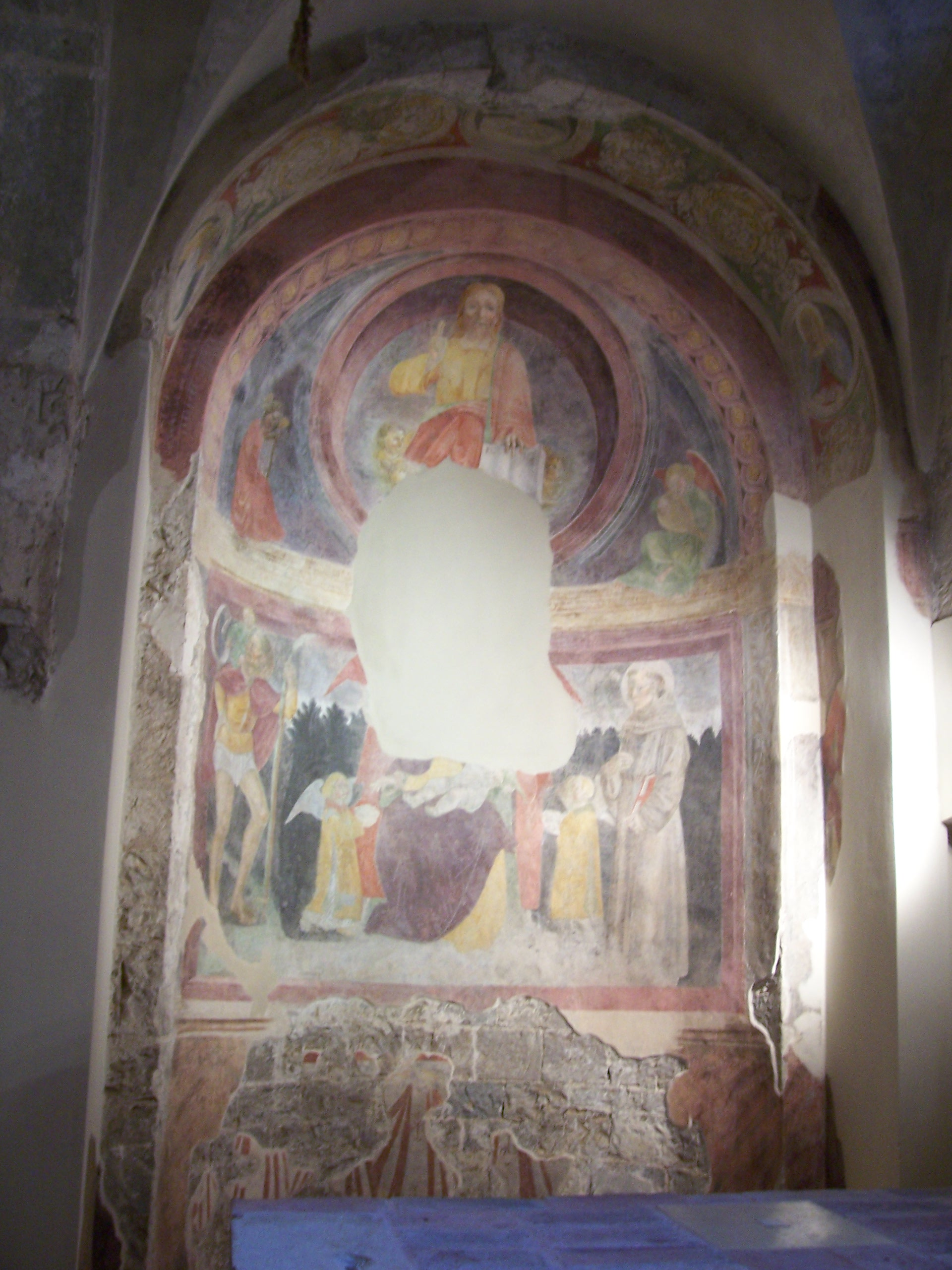 san giorgio (brescia) affreschi3.jpg